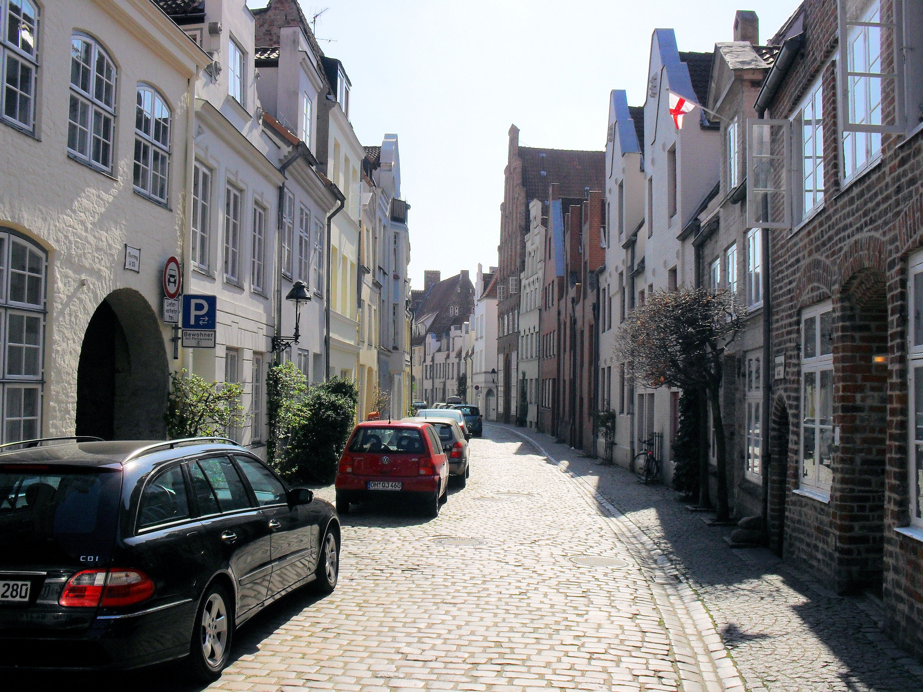 Die Engelswisch in Lübeck